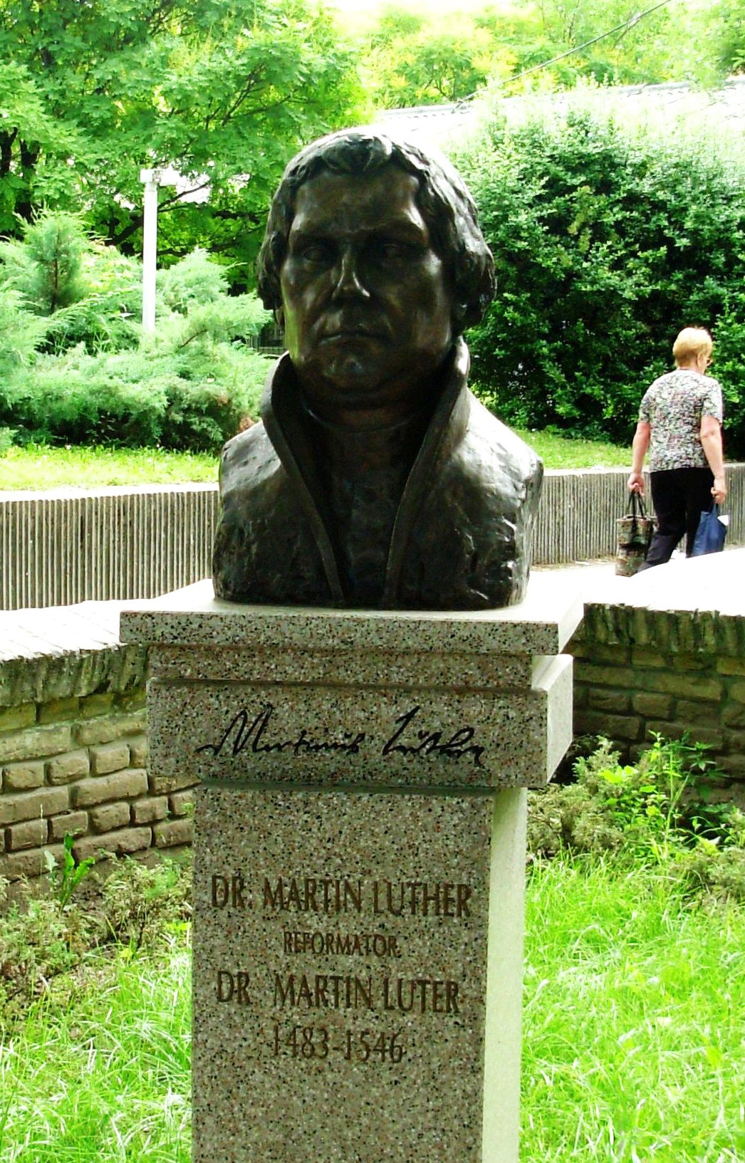 Spomenik Martinu Luteru, Subotica. Slikao Goldfinger